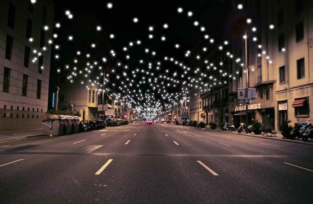 Calçada del carrer d'Aragó al seu encreuament amb el Carrer de Roger de Llúria, amb il·luminació nadalenca.